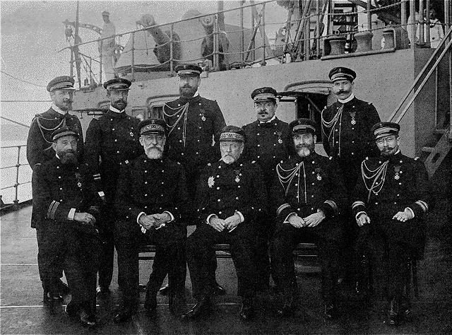 Commandement en chef de la 2e escadre, à bord du cuirassé Patrie. Debout : Lieut. de vaisseau de La Passardière ; capitaine de frégate du Couédic ; Lieutenant de vaisseau Dubois ; Mécan. d'esc. Bour. Lieutenant de vaisseau de Ruffi de Pontevez. Assis : capitaine de vaisseau André Fouet ; contre-amiral Moreau ; vice-amiral Louis de Marolles ; cap. de vaisseau Amet ; capitaine de frégate Richard.